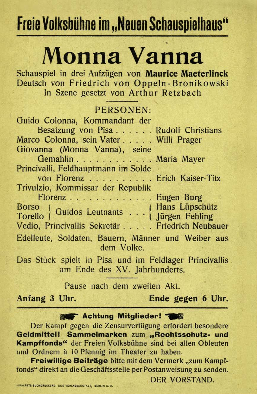 Monna Vanna von Maurice Maeterlinck. Theaterzettel der Freien Volksbühne Berlin vom 4. Dezember 1910.